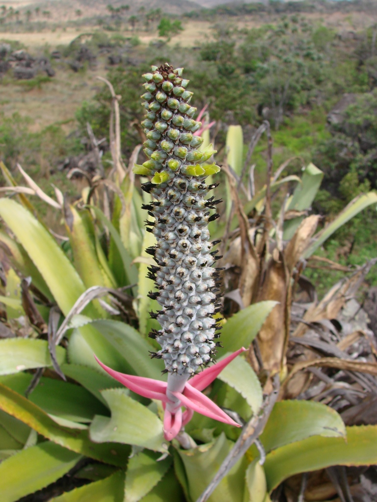 Aechmea bromeliifolia - Parque Estadual Serra dos Pirineus - Pirenópolis - Goiás - Brasil